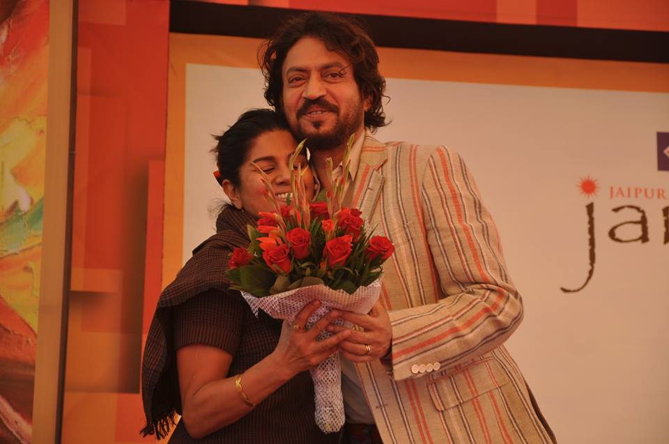 jairangam photo